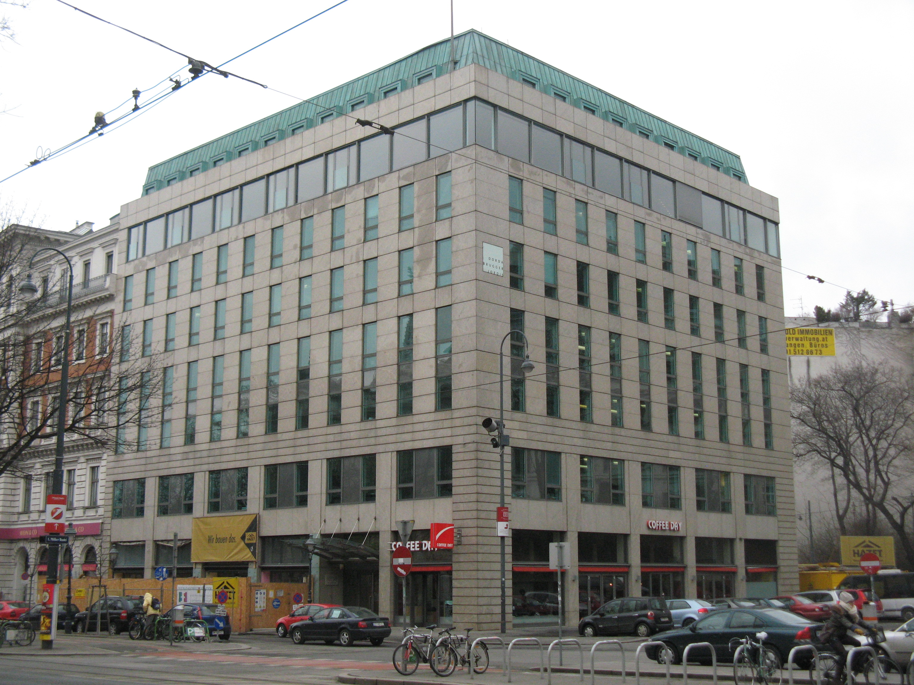 Haus Dr.-Karl-Lueger-Ring 10, Wien-Innere Stadt